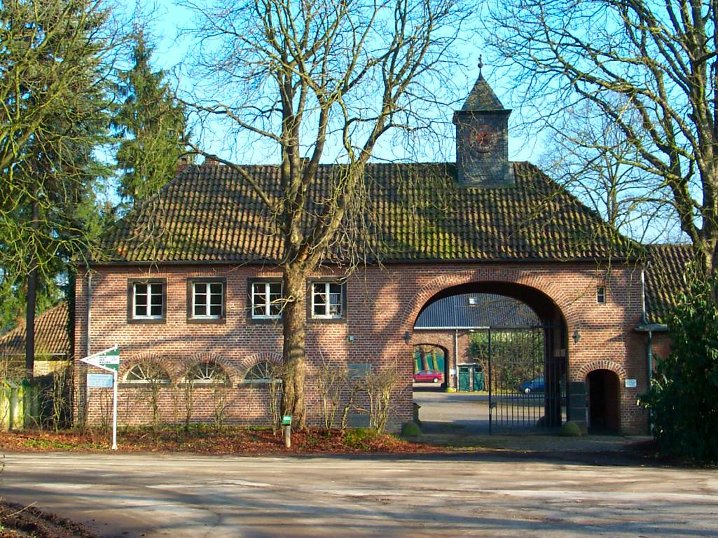 Gut Leidenhausen, Köln-Eil This is a photograph of an architectural monument.